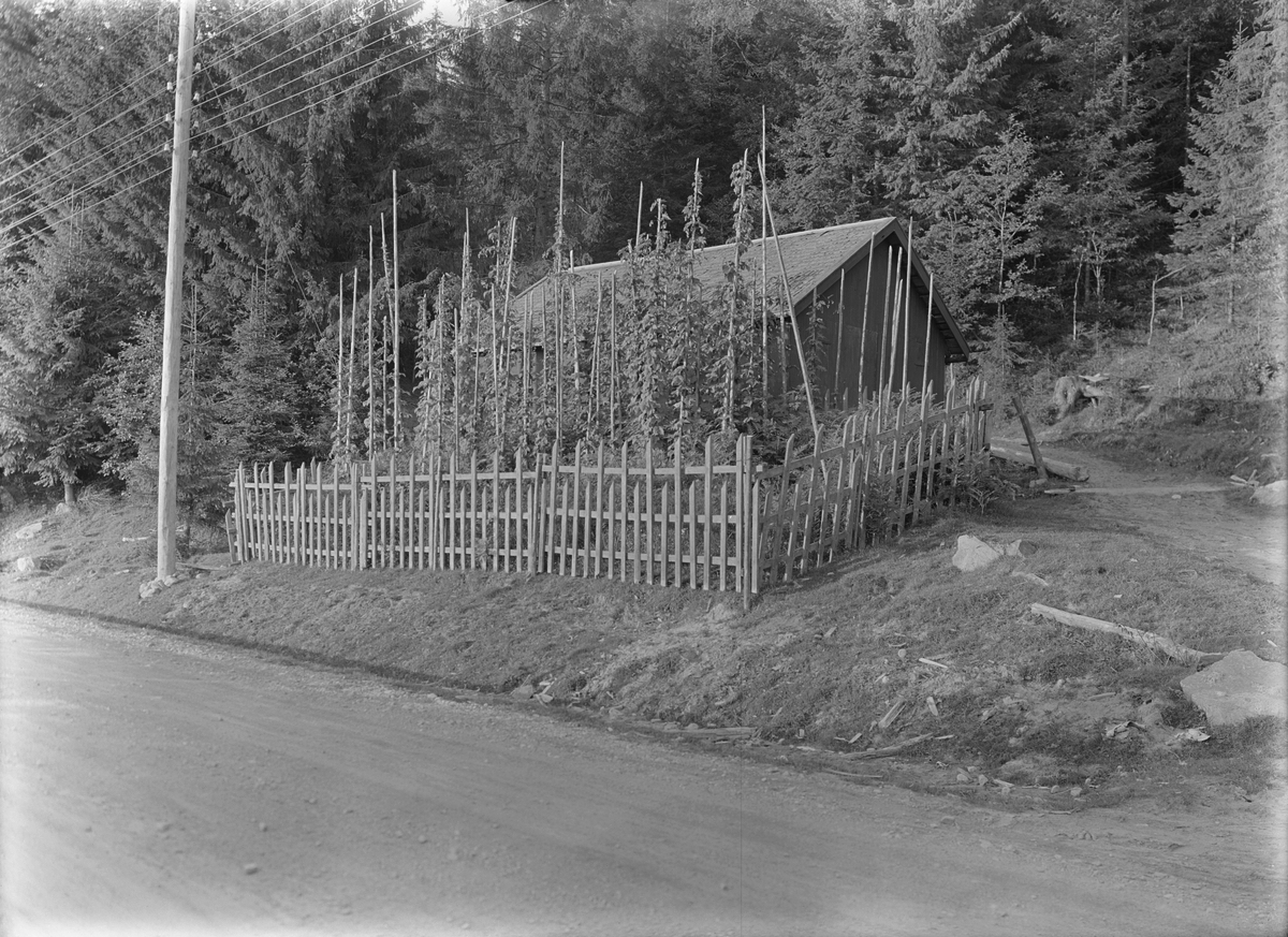 Värmland. Älvdals hd. N. Ny sn. Ö. Värnäs. Jonas Nordkvist. Humlegård. Foto G. Berg 1928. Etnologiska undersökningarna NORDISKA MUSEET 1001. Sp. 98 Pors och humle för brygd.